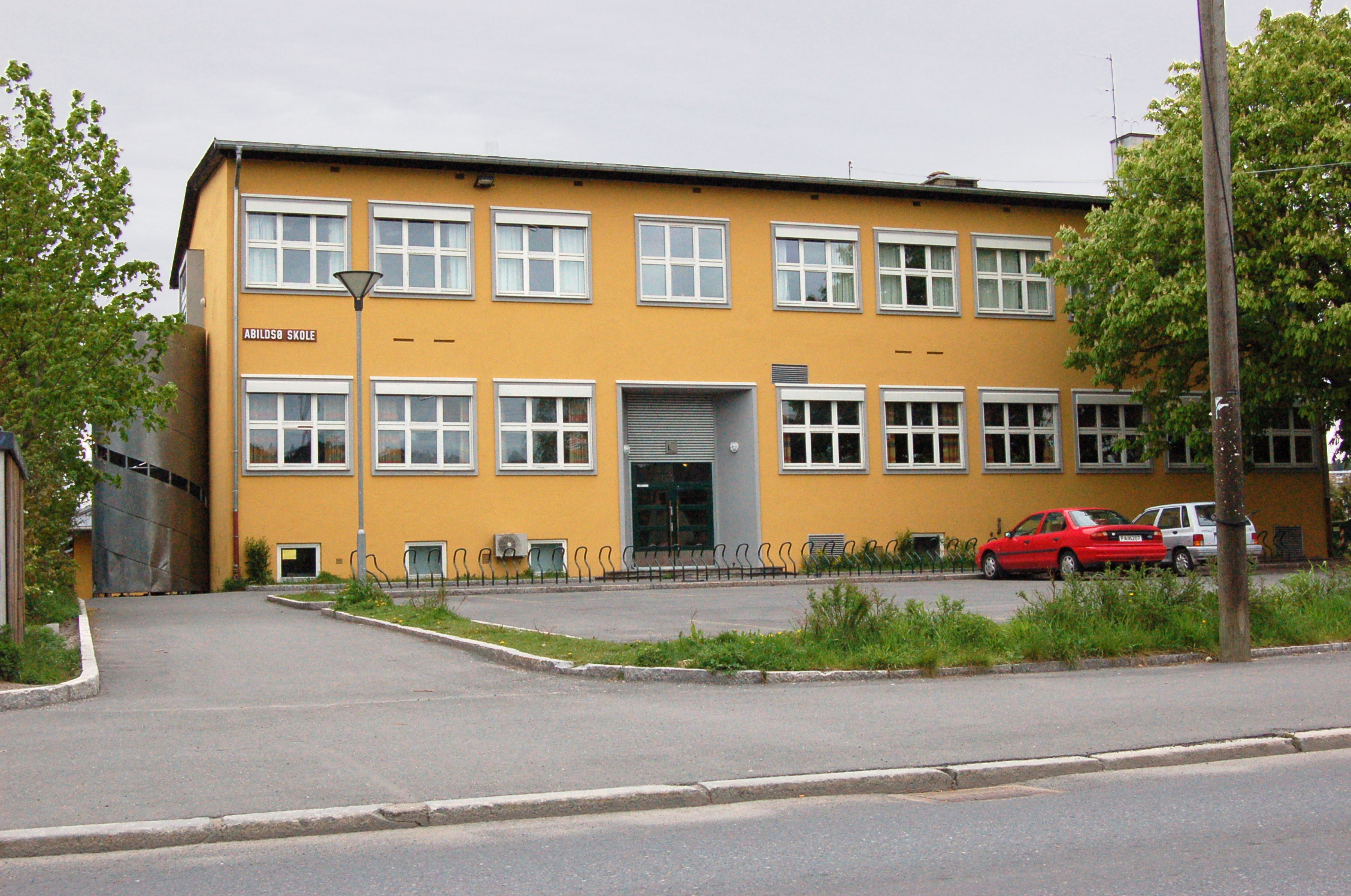 Abildsø skole i Oslo